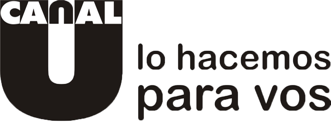 logotipo original, oficial del Canal Universitario de Antioquia, Uso Publico